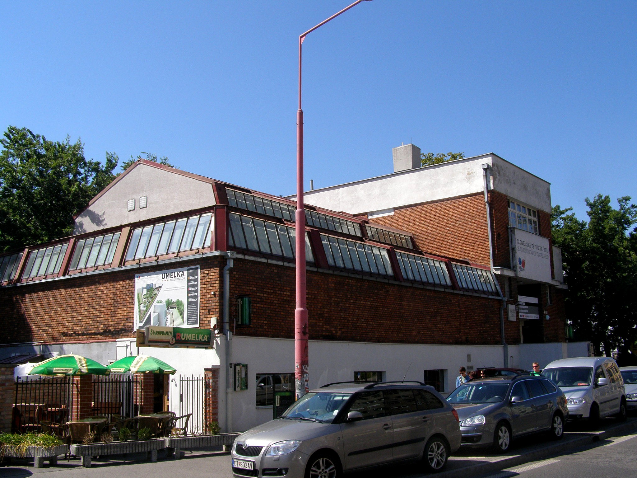 Dostojevského rad č. 2. Sídlo Umeleckej besedy slovenskej. Projekt stavby z rokov 1925 - 1927 je dielom architektov Aloisa Balána a Jiřího Grossmanna Object location48° 08′ 27.96″ N, 17° 07′ 02.64″ E